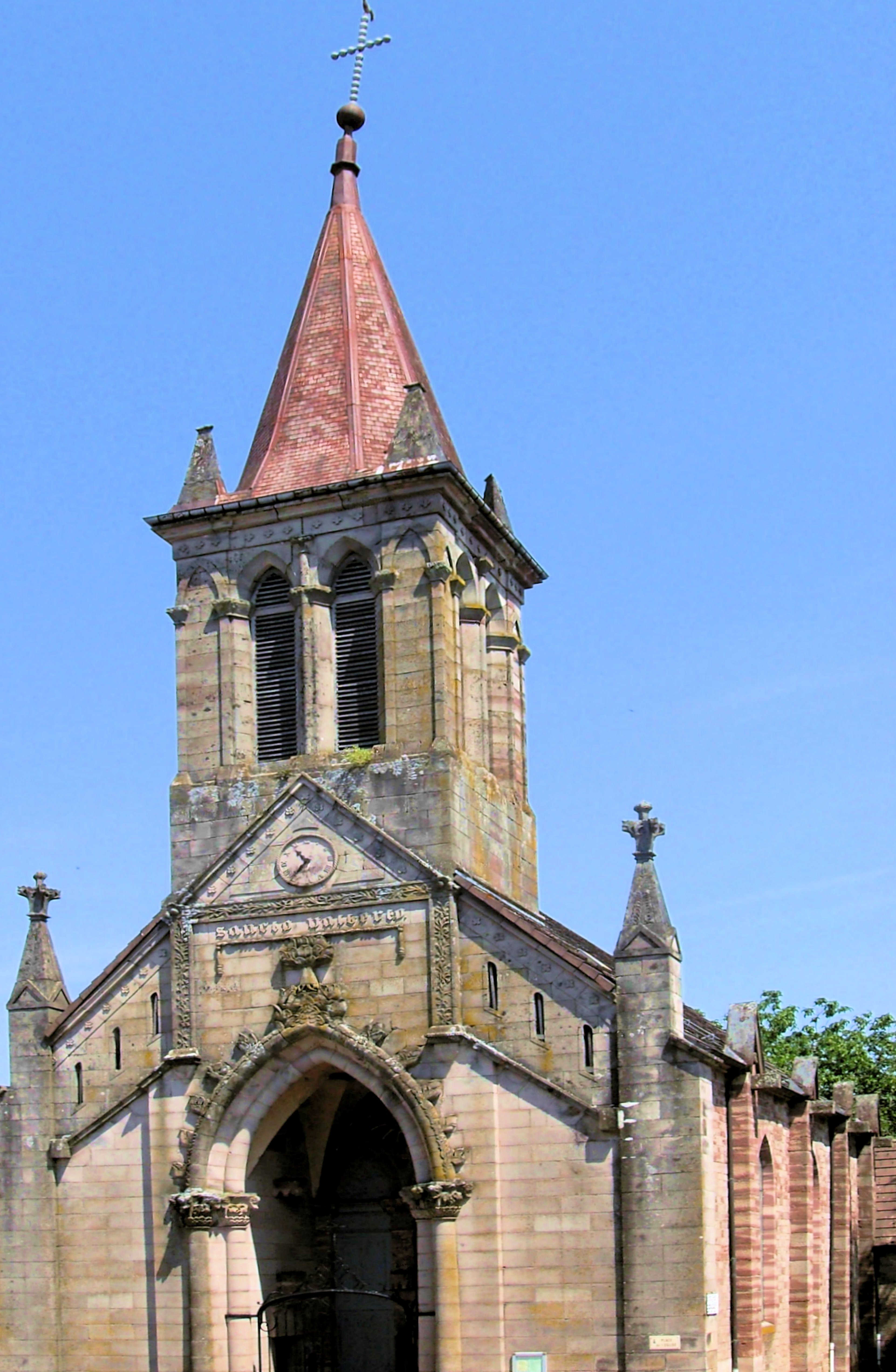 L'église Saint-Valbert à Saint-Valbert